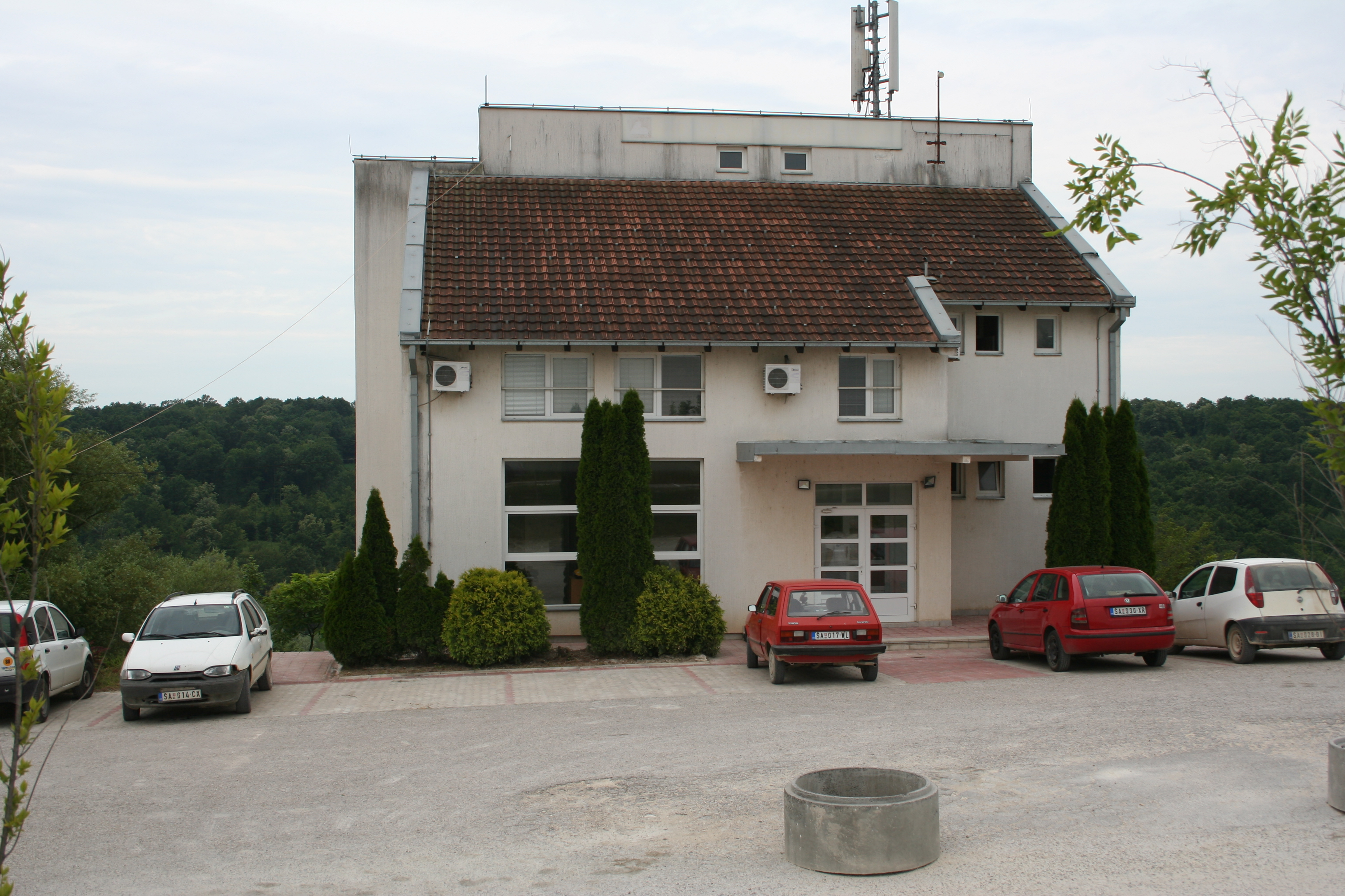 Jazovnik, opština Vladimirci, upravna zgrada kamenoloma